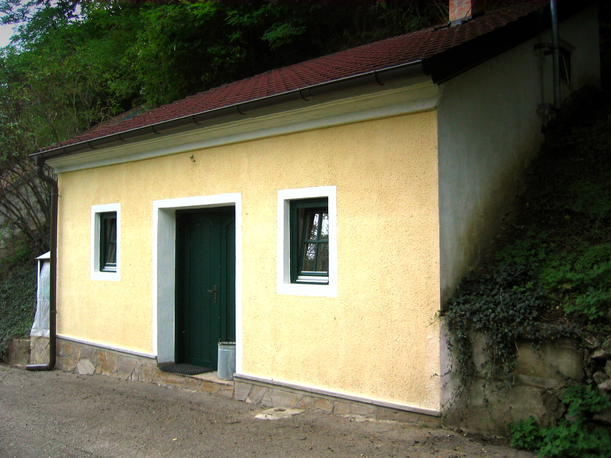 Mühlbergkellergasse Objekt 15